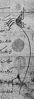 Tughraähnliche Handfeste (pençe) des Großwesirs Kara Mustafa Pascha auf der Kapitulationsaufforderung an die Wiener Obrigkeit während der Zweiten Wiener Türkenbelagerung 1683